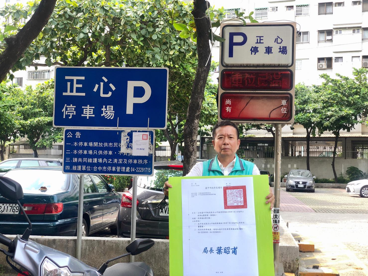 中文（台灣）: 何文海議員爭取正心停車場改善